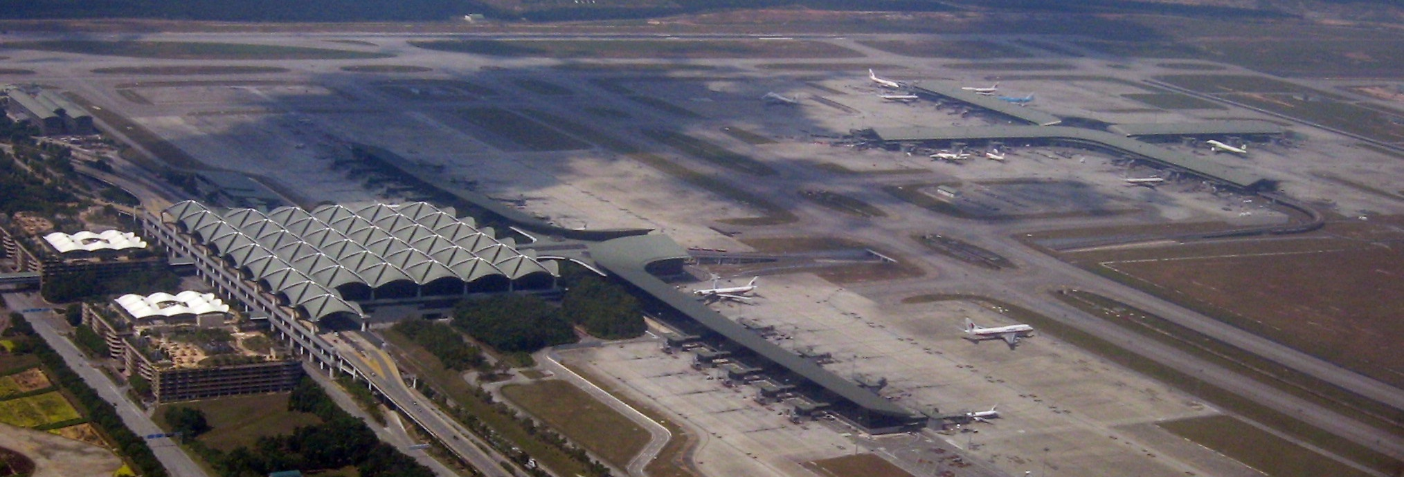 KLIA overview